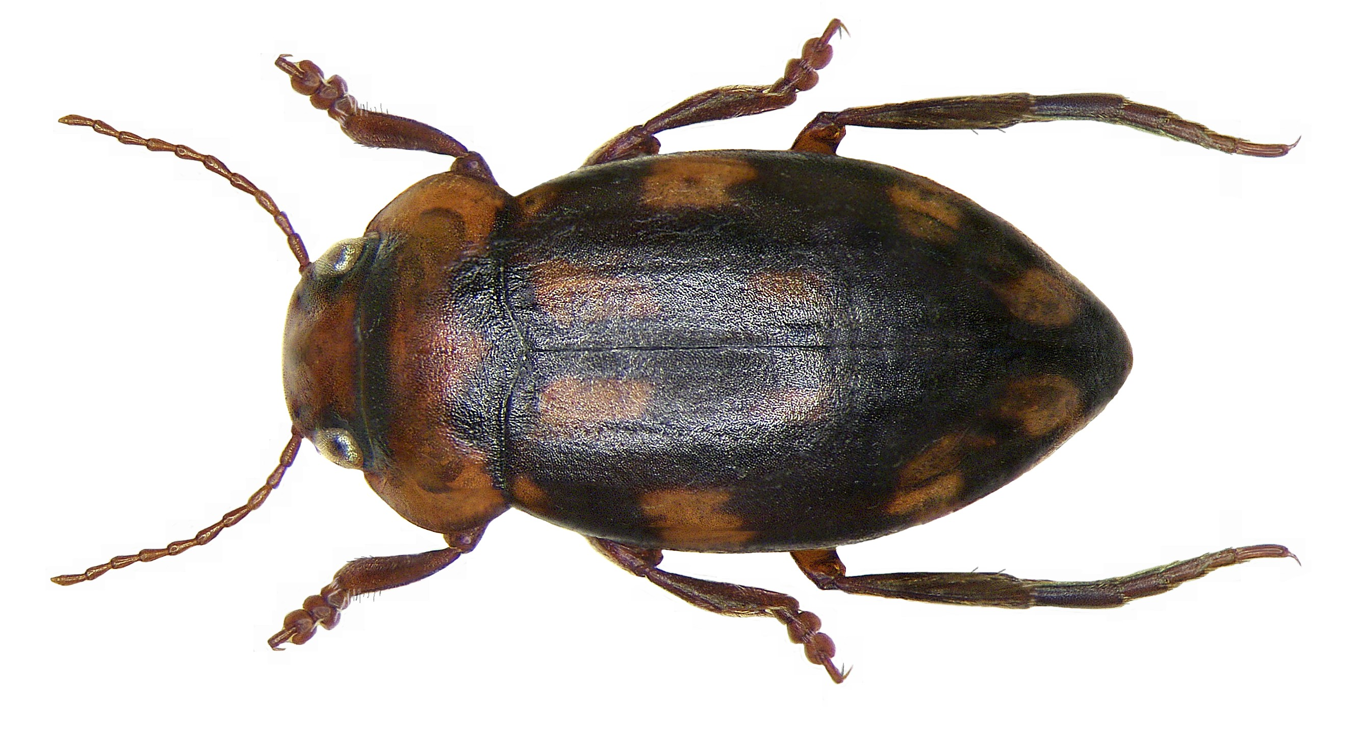 Stictotarsus duodecimpustulatus (Fabricius, 1792) Familie: Dytiscidae Größe: 5-9 mm Verbreitung: West-Europa, Süd-Europa, Nordafrika, England Fundort: Korsika, Calvi leg.det. U.Schmidt, 1973 Foto: U.Schmidt, 2008